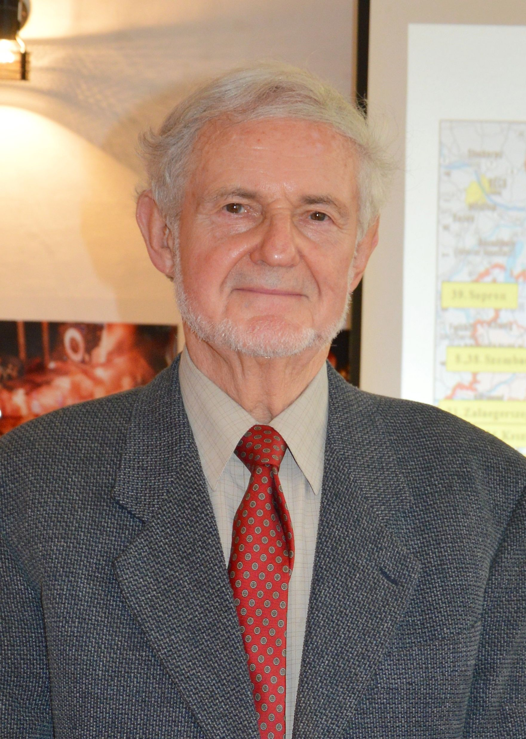 Hámori Jenő olimpiai bajnok kardvívó